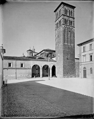 Rieti - Cattedrale di S. Maria Assunta